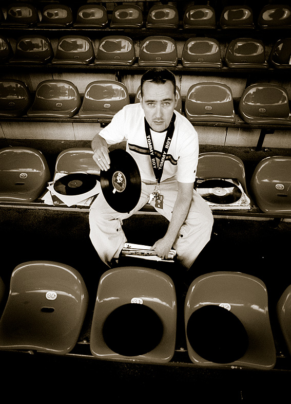 DJ Koolmann von 5 Sterne im St Pauli Stadion